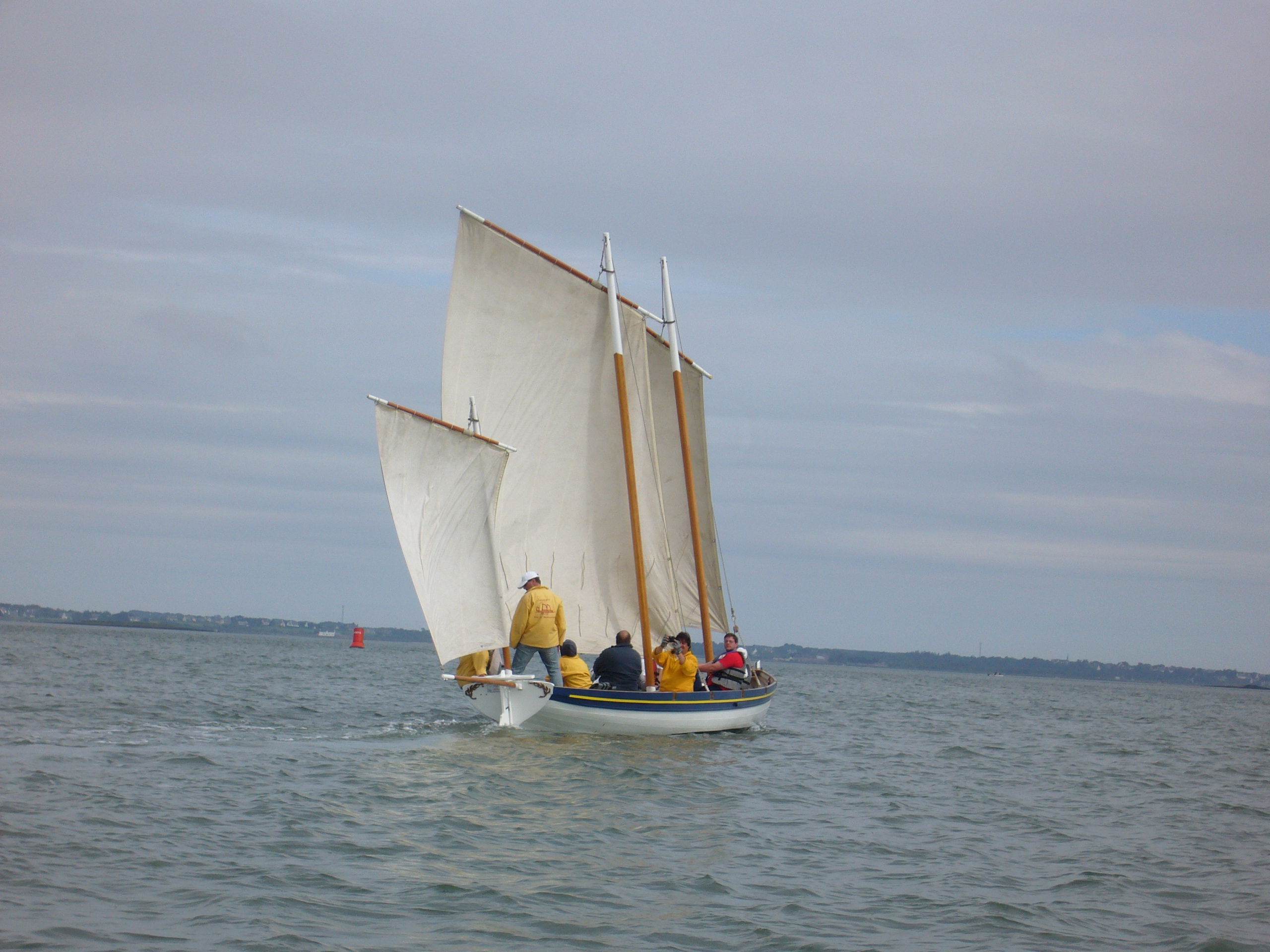 Laïssa Ana, yole de Villefranche-sur-Mer à la Semaine du Golfe du Morbihan de mai 2007